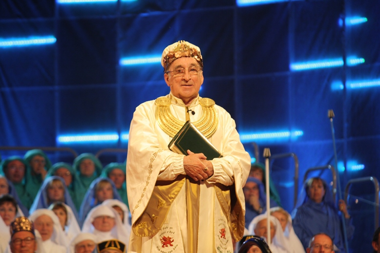 Yr Archdderwydd Jim Parc Nest ar lwyfan Eisteddfod Wrecsam 2011, yn ystod Defod y Coroni.